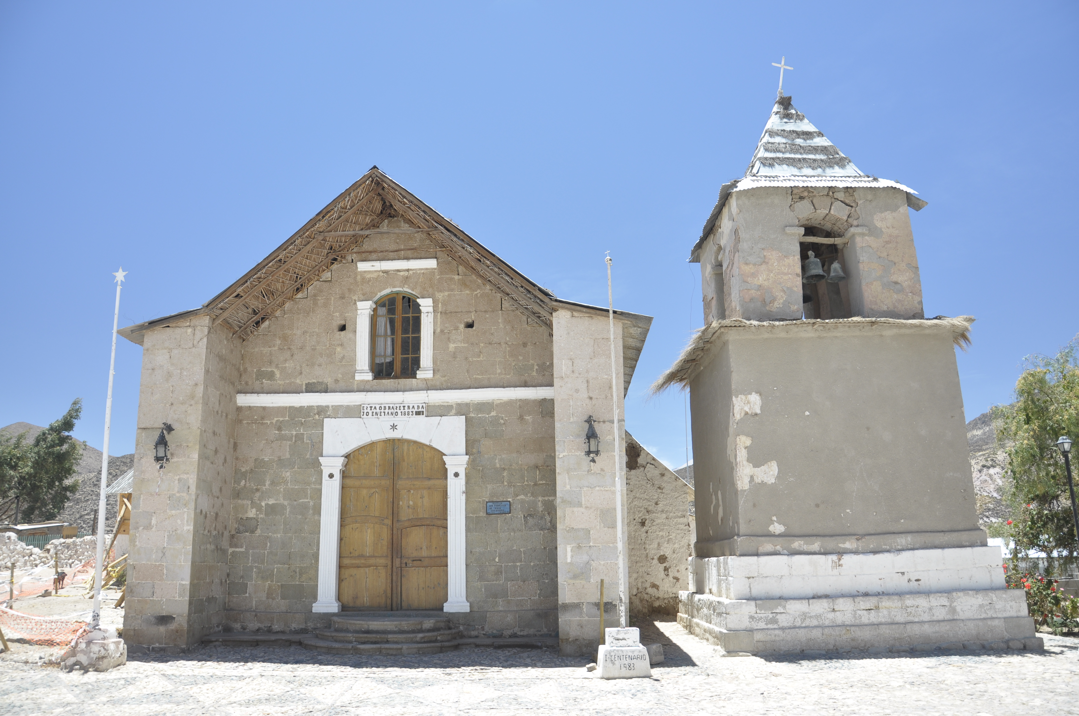 Iglesia San Francisco de Asís de Socoroma This is a photo of a national monument in Chile: 951